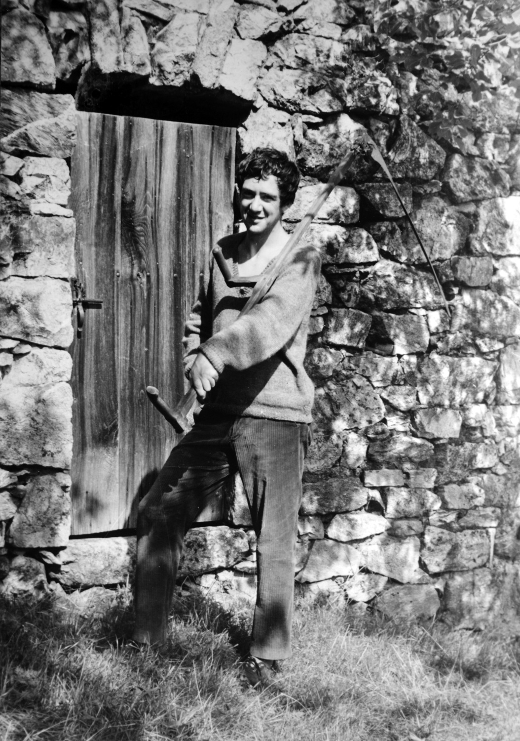 Marie-Claude White, Portrait de Kenneth White à Gourgounel, Ardèche.